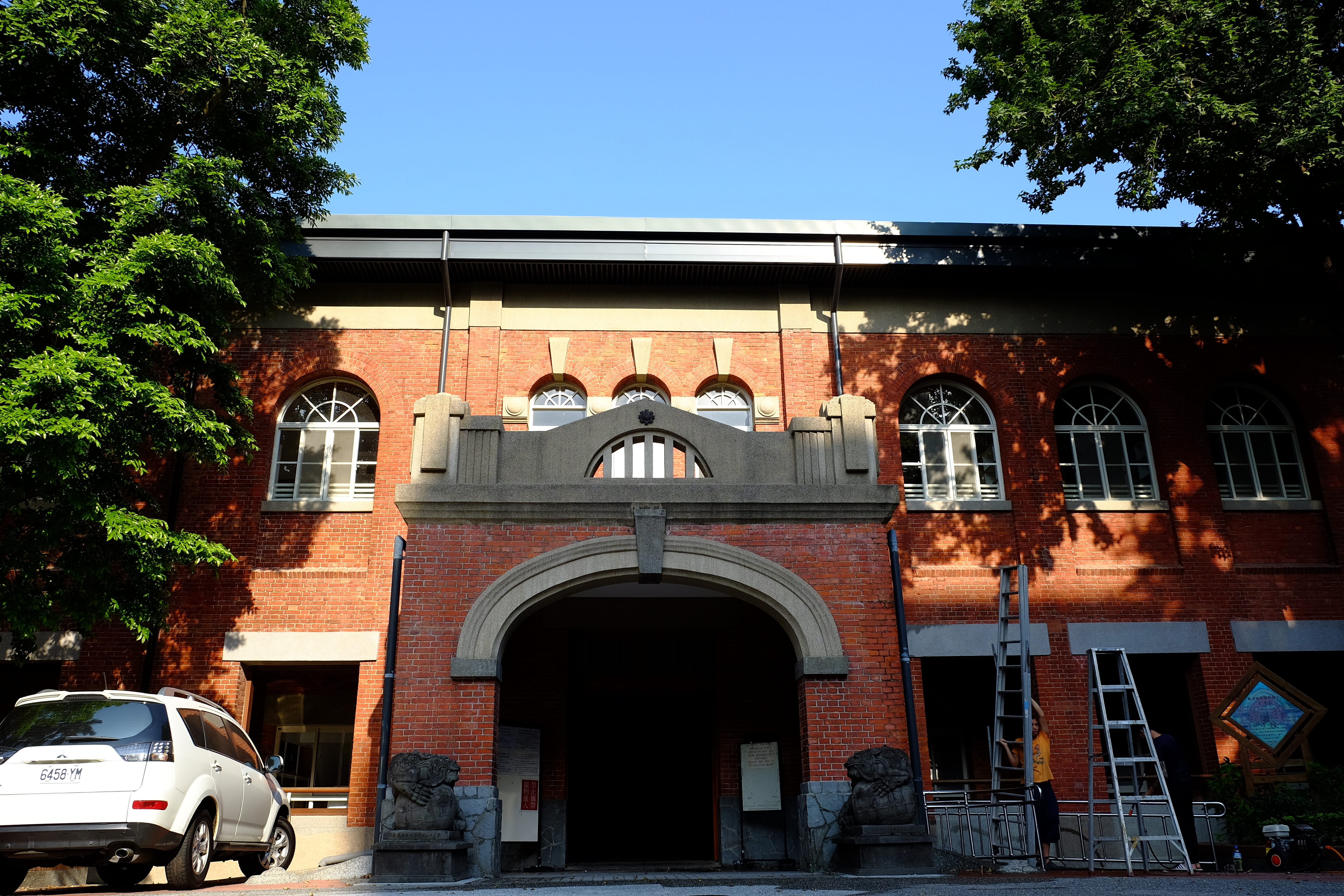 臺北市大同區日新國民小學 Taipei Municipal Rixin Elementary School